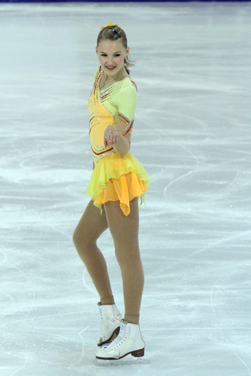 Беата Папп (Финляндия) на чемпионате мира по фигурному катанию среди юниоров 2010.